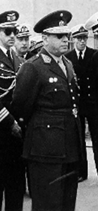 Gral.Manuel A.Odria en los Ambos líderes compartían una visión política que buscaba la modernizar el país, donde se privilegiaba la educación, la salud pública y la seguridad nacional, así como la integración.